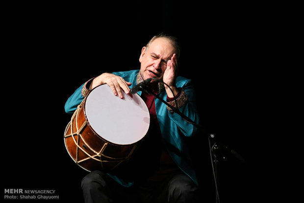 نوازنده چیره دست قاوال،نقاره،گارمون